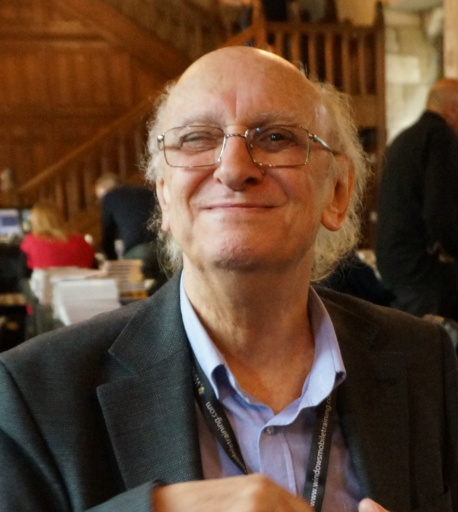 Lors du 9e Festival Interpol'art de Reims.